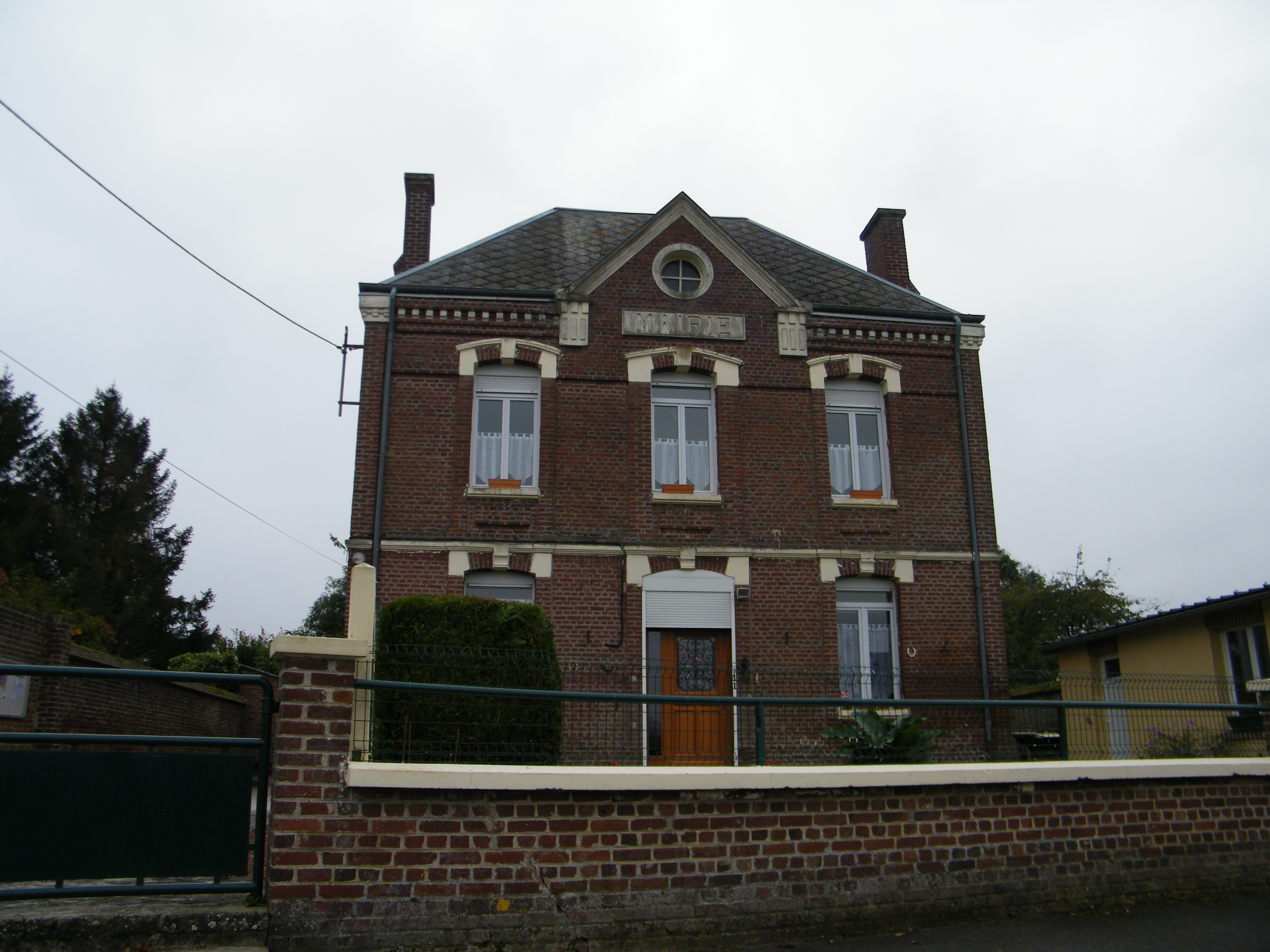 Bâtiments communaux.